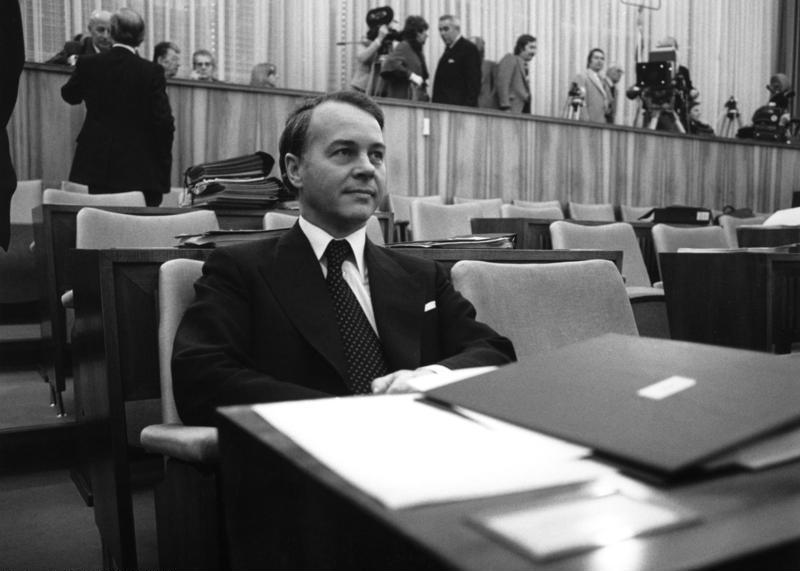 12. März 1976 Albrecht, Ernst Bundesrat stimmt Polen-Vereinbarungen zu